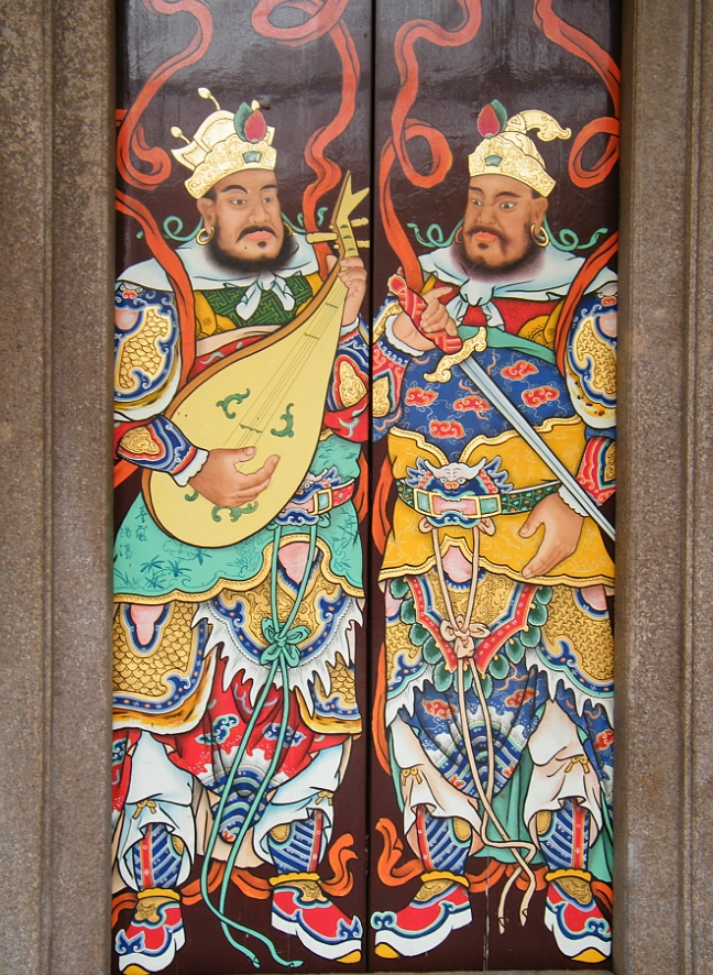 汕头 存心善堂 左侧门门神 南方增长天王，东方持国天王